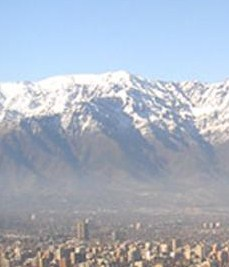 Cerro de Ramón